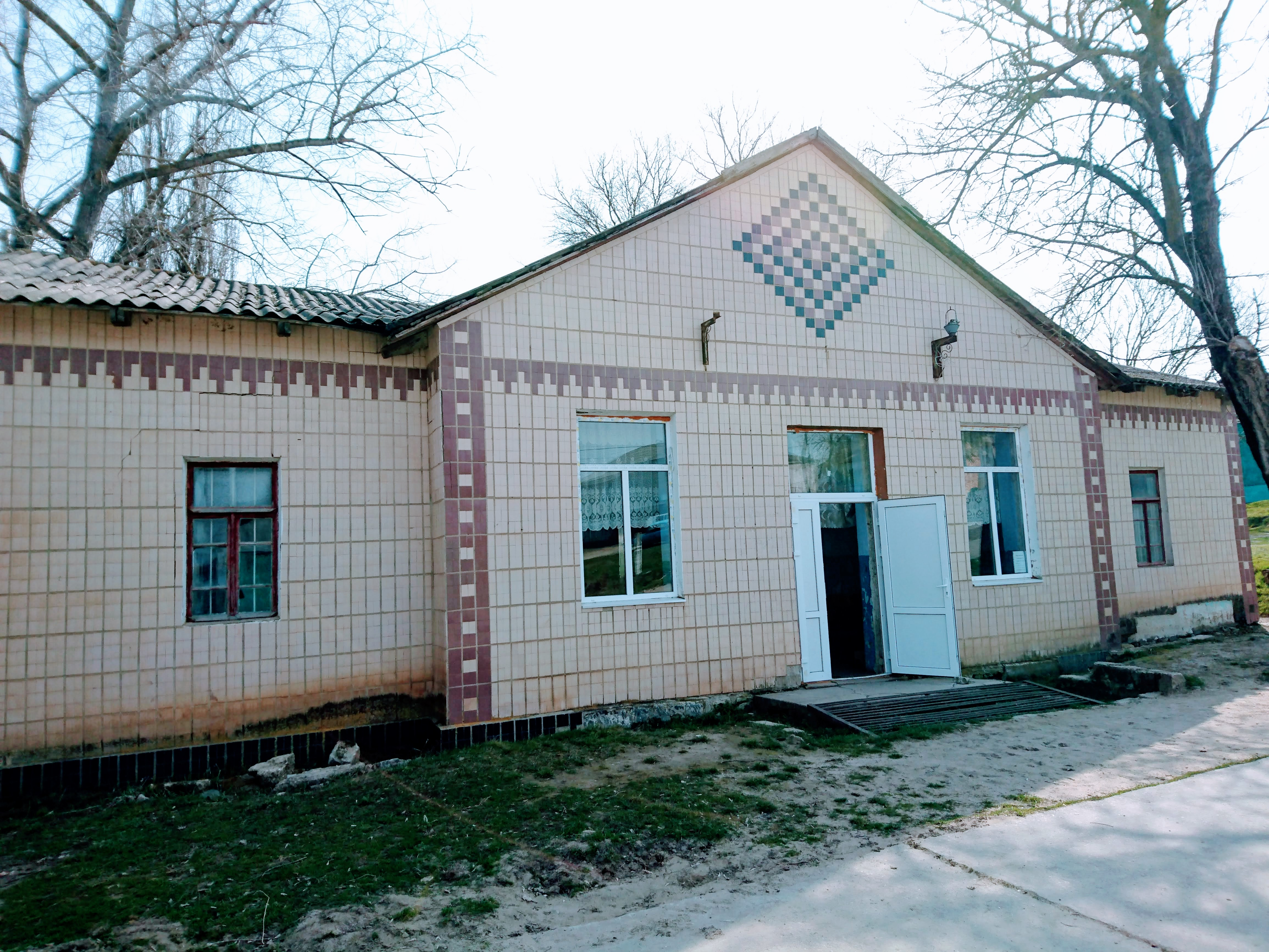 Фасад